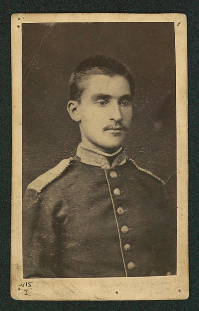 Георги Измирлиев